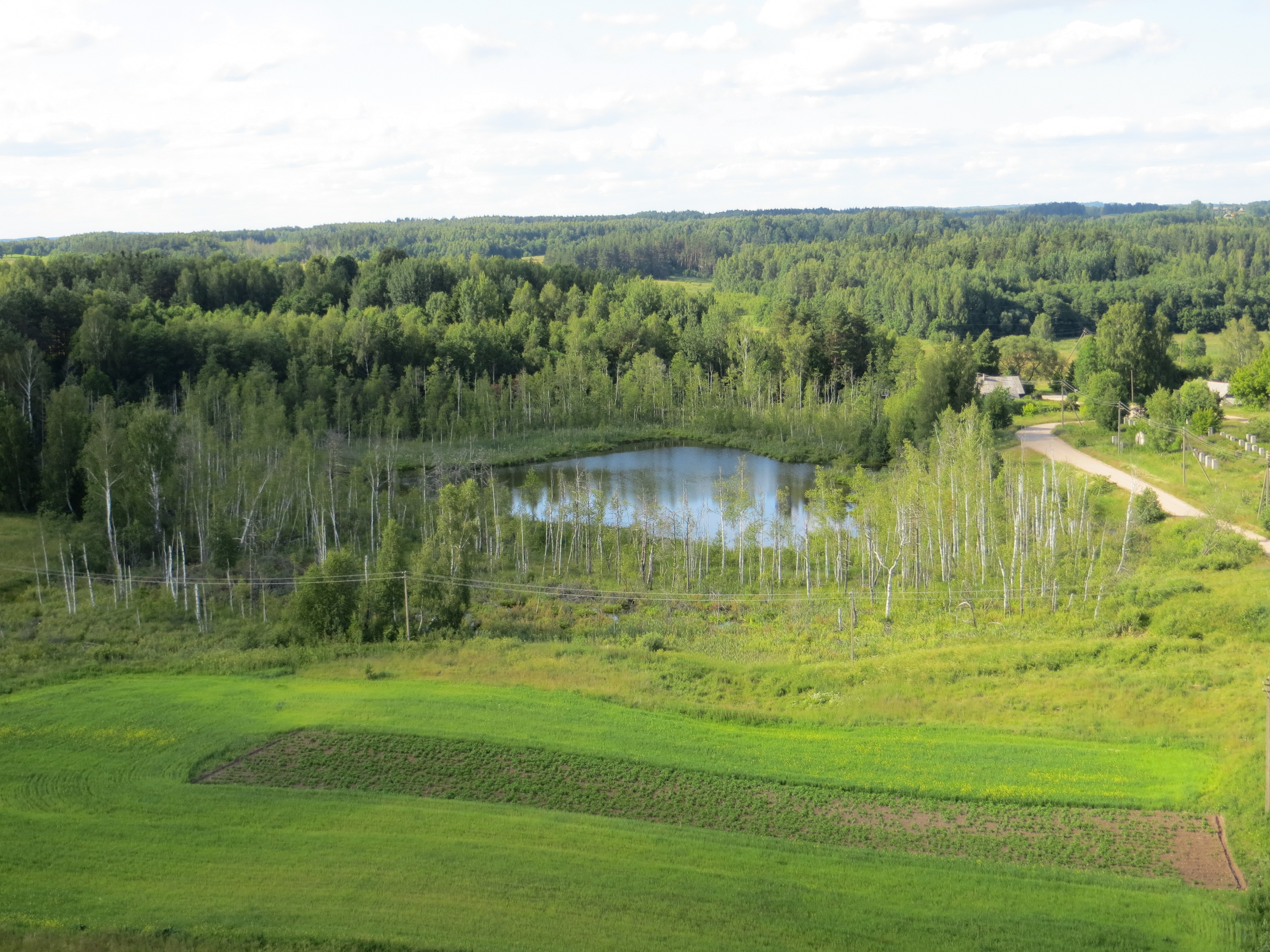 Šiliniai, Lithuania